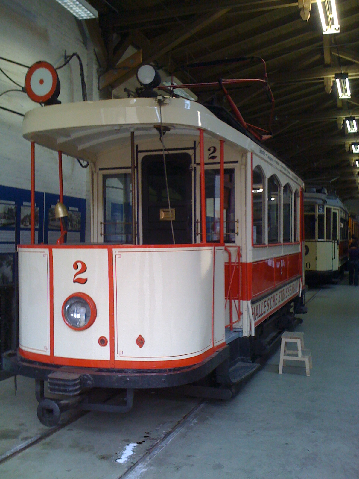 Wagen 2 des Straßenbahnmuseums Halle (Saale)